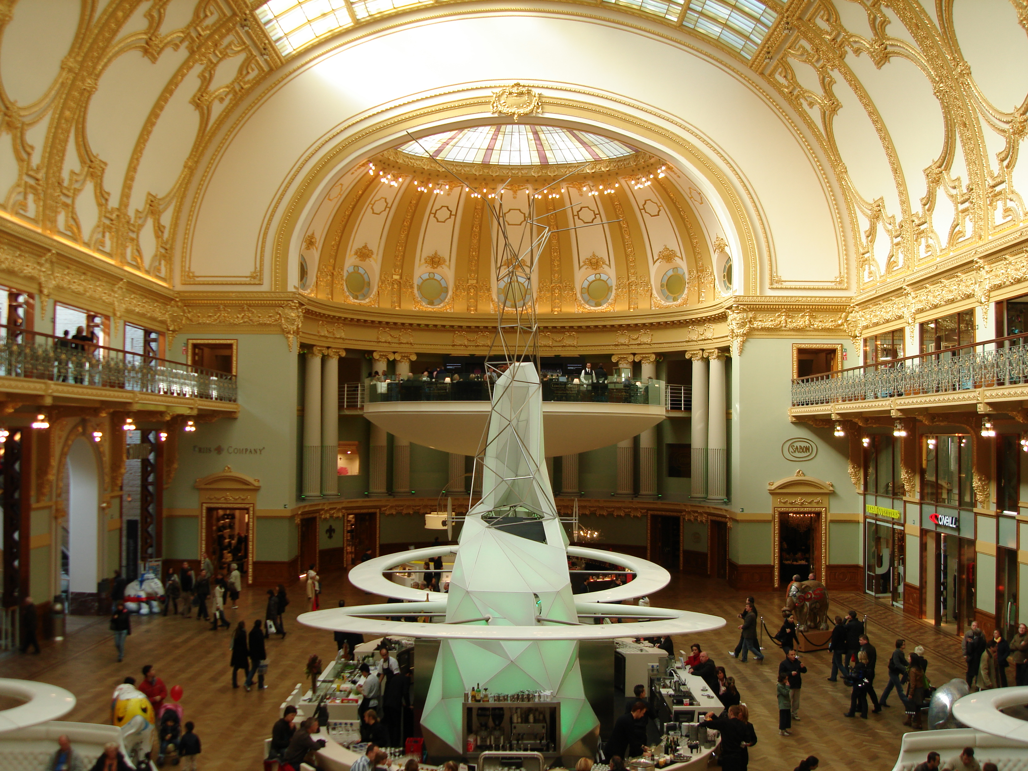 Stadsfeestzaal (Antwerpen)